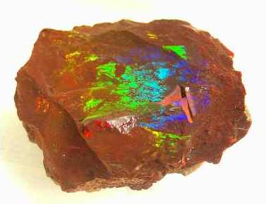 minerał; opal, pochodzenie Etiopia; autor zdjęcia Ewa Jastrzębska 15.06.2006r.